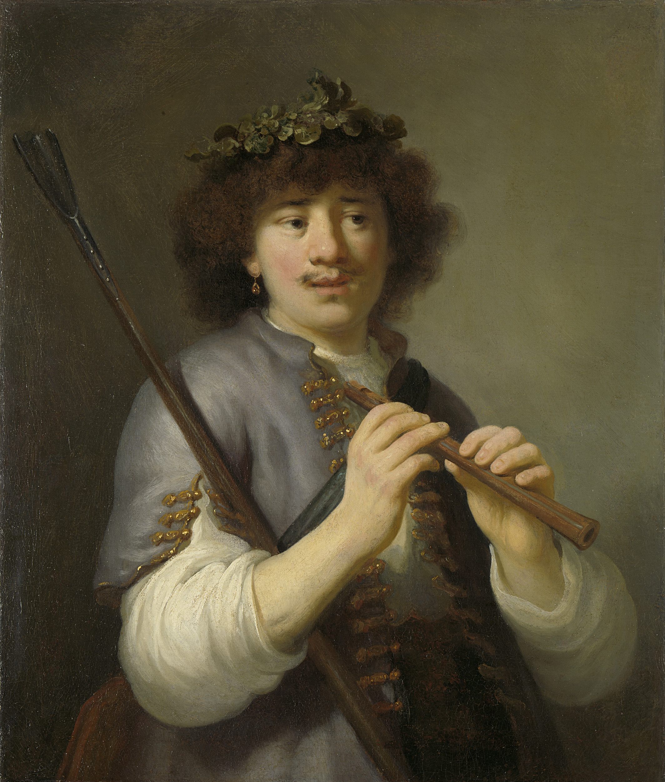 Portret van Rembrandt als herder met staf, een fluit in de handen en een krans van bladeren op het hoofd. Een oorbel in het rechteroor. Pendant van het portret van een herderin gedateerd 1636 in Braunschweig.